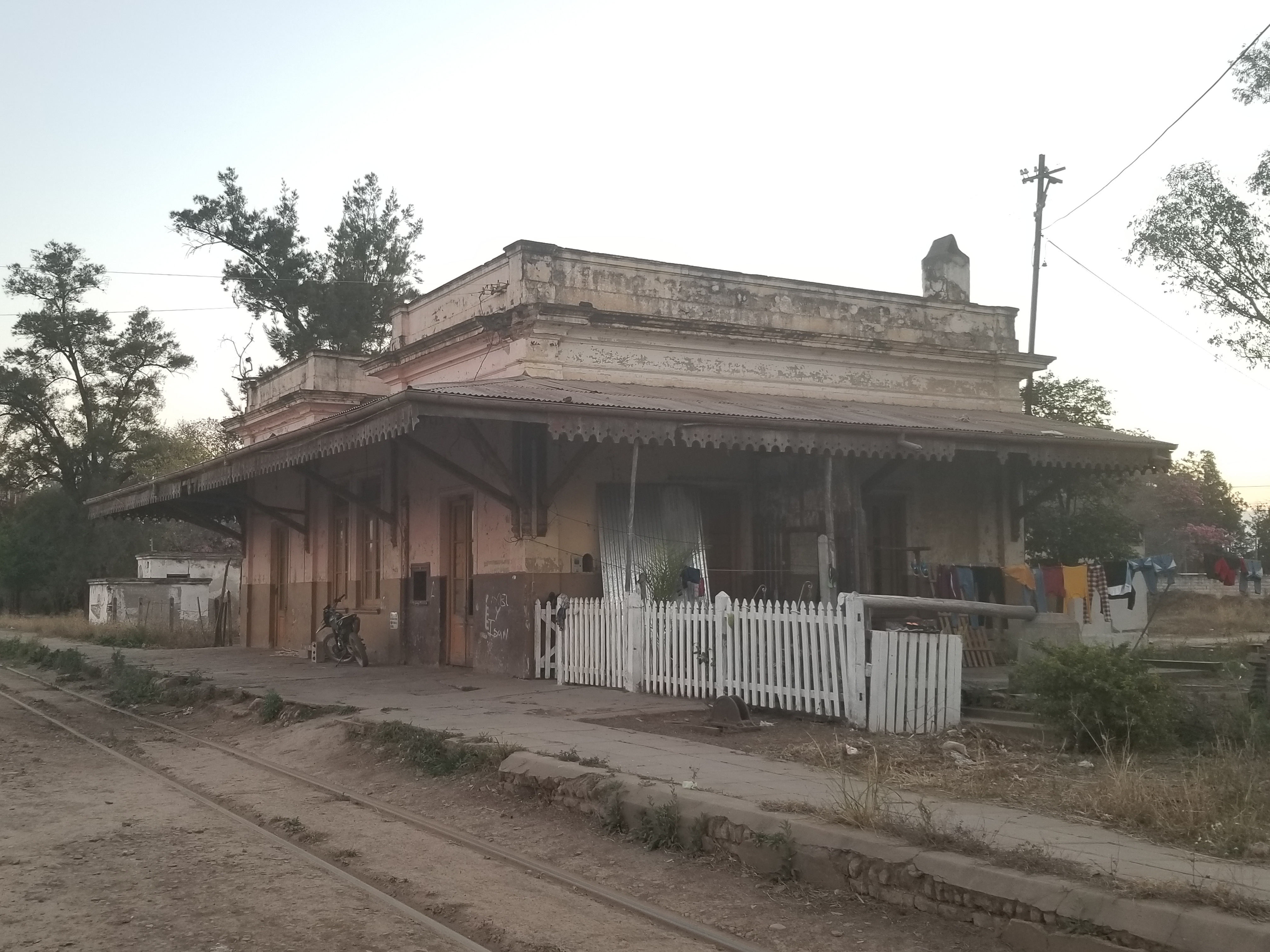 Estación Pampa Blanca, Jujuy, Argentina.